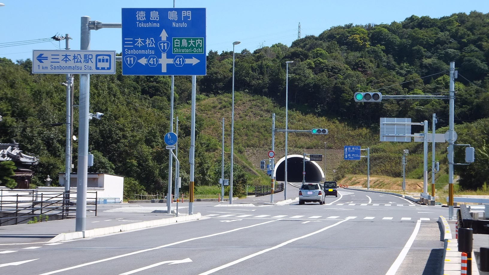 国道11号 白鳥大内バイパス （香川県東かがわ市川東）高松方より撮影